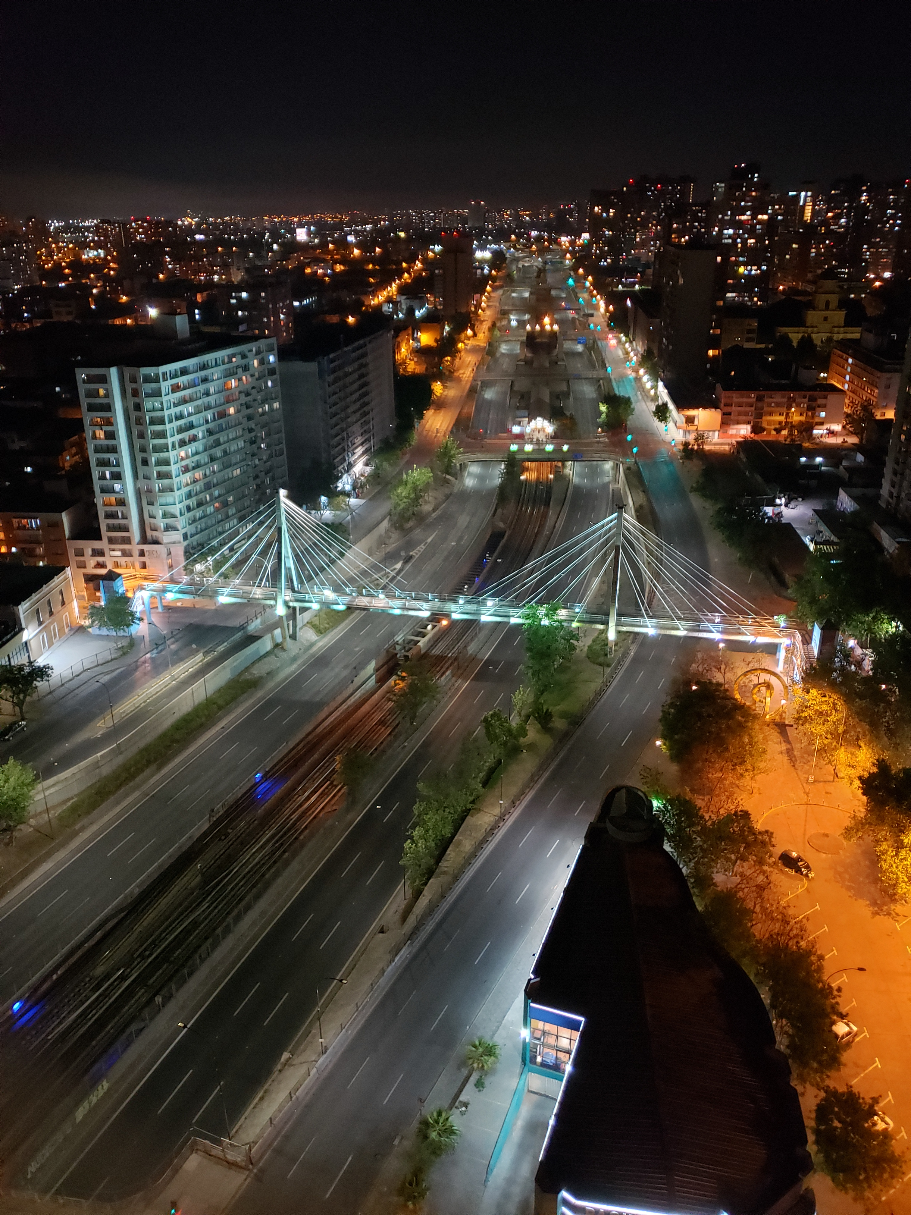 Una vacía Autopista Central en Santiago de Chile por el toque de queda vigente para la noche del 20 de octubre de 2019